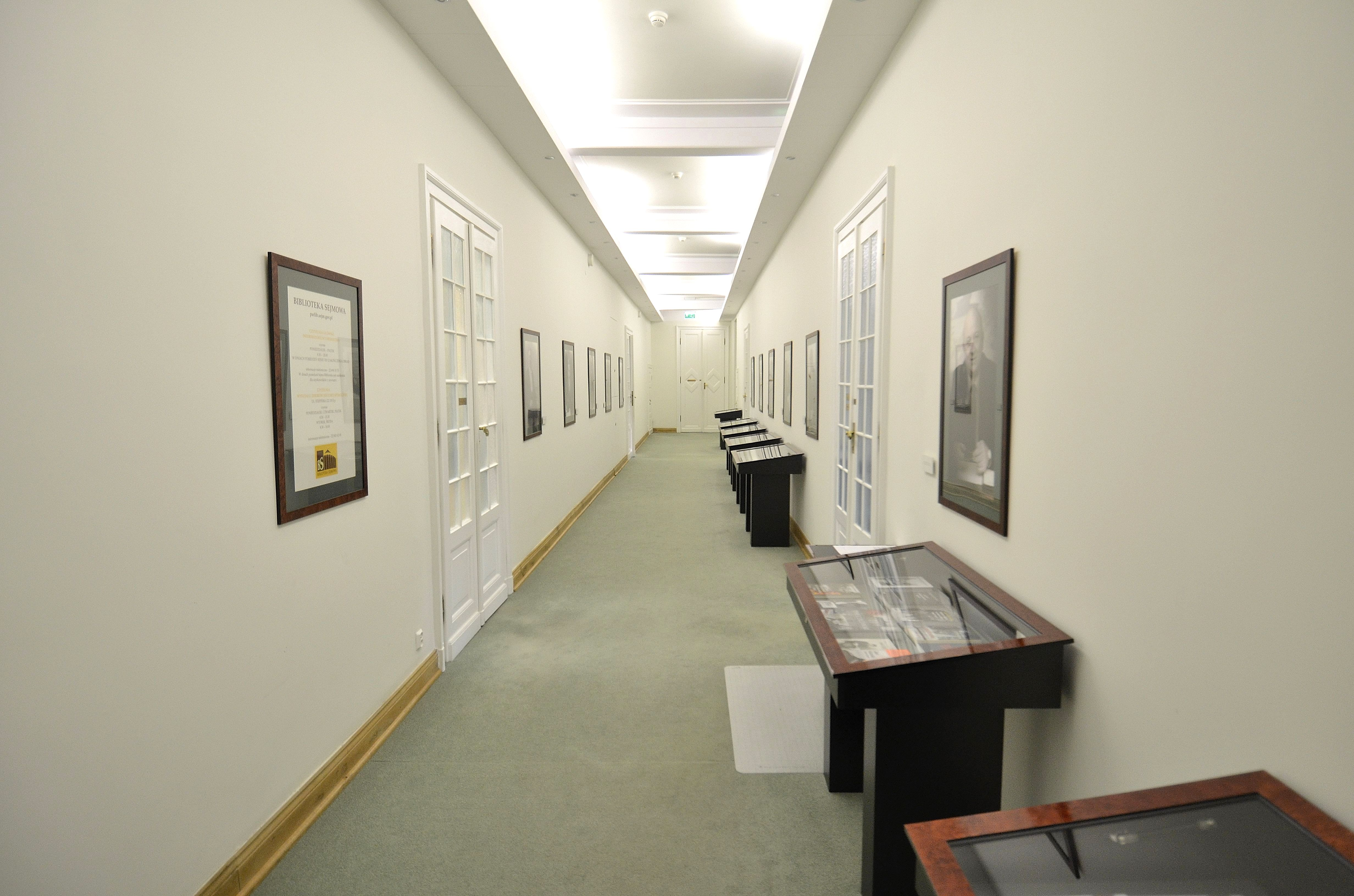 Biblioteka Sejmowa w Warszawie